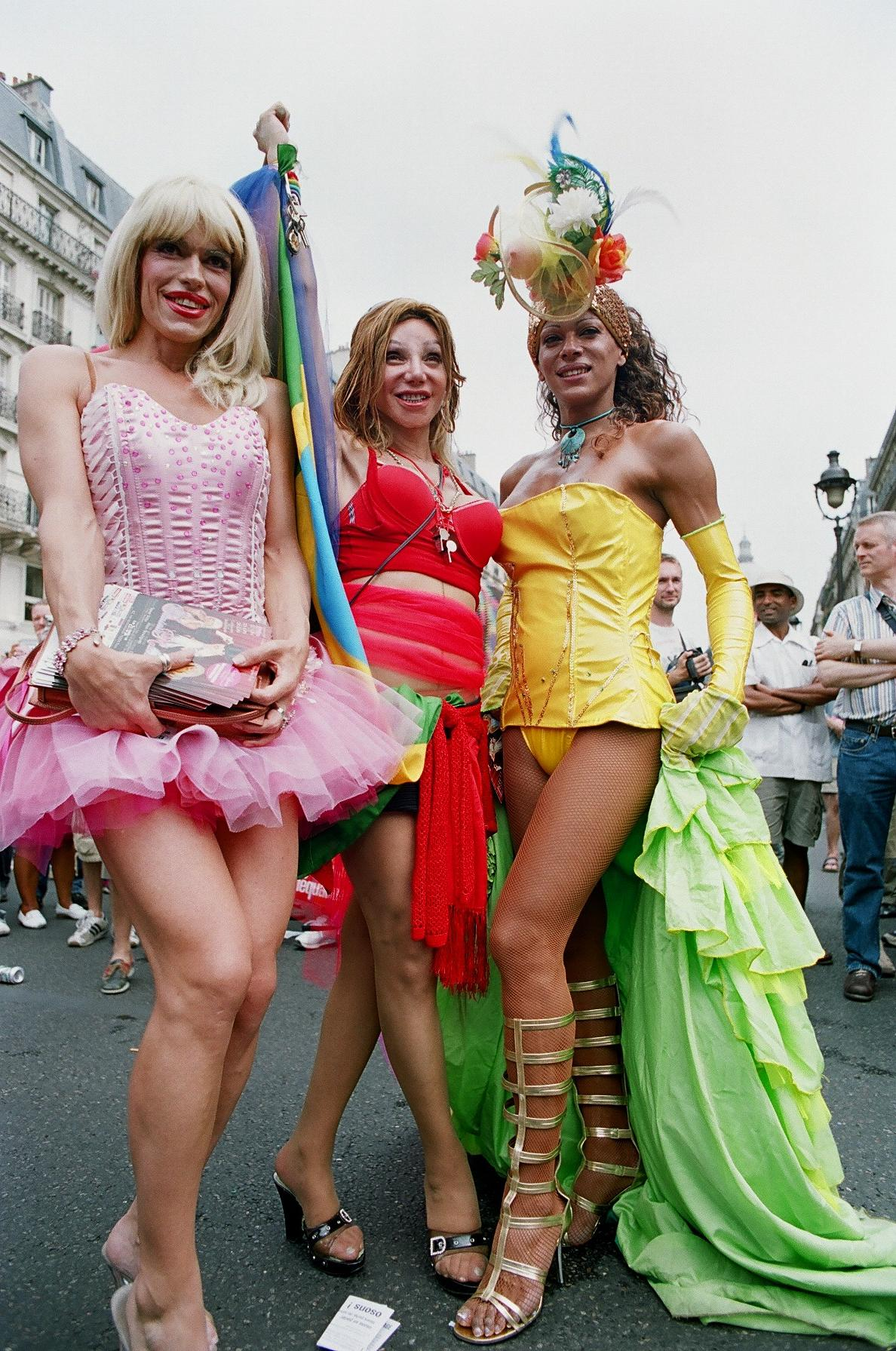 Activistes des Transgenres à la Gay Pride à Paris en France. Au centre, Camille Cabral